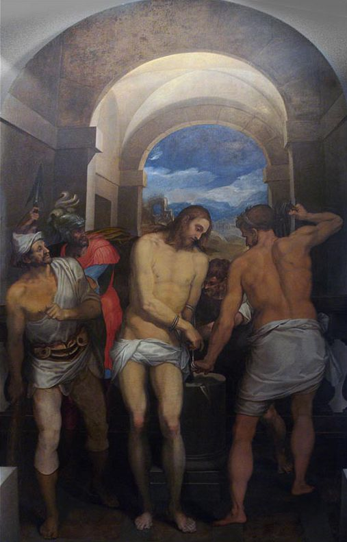 Flagelação de Cristo